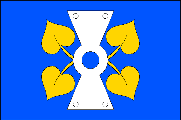 vlajka, Lipová ,okres Přerov